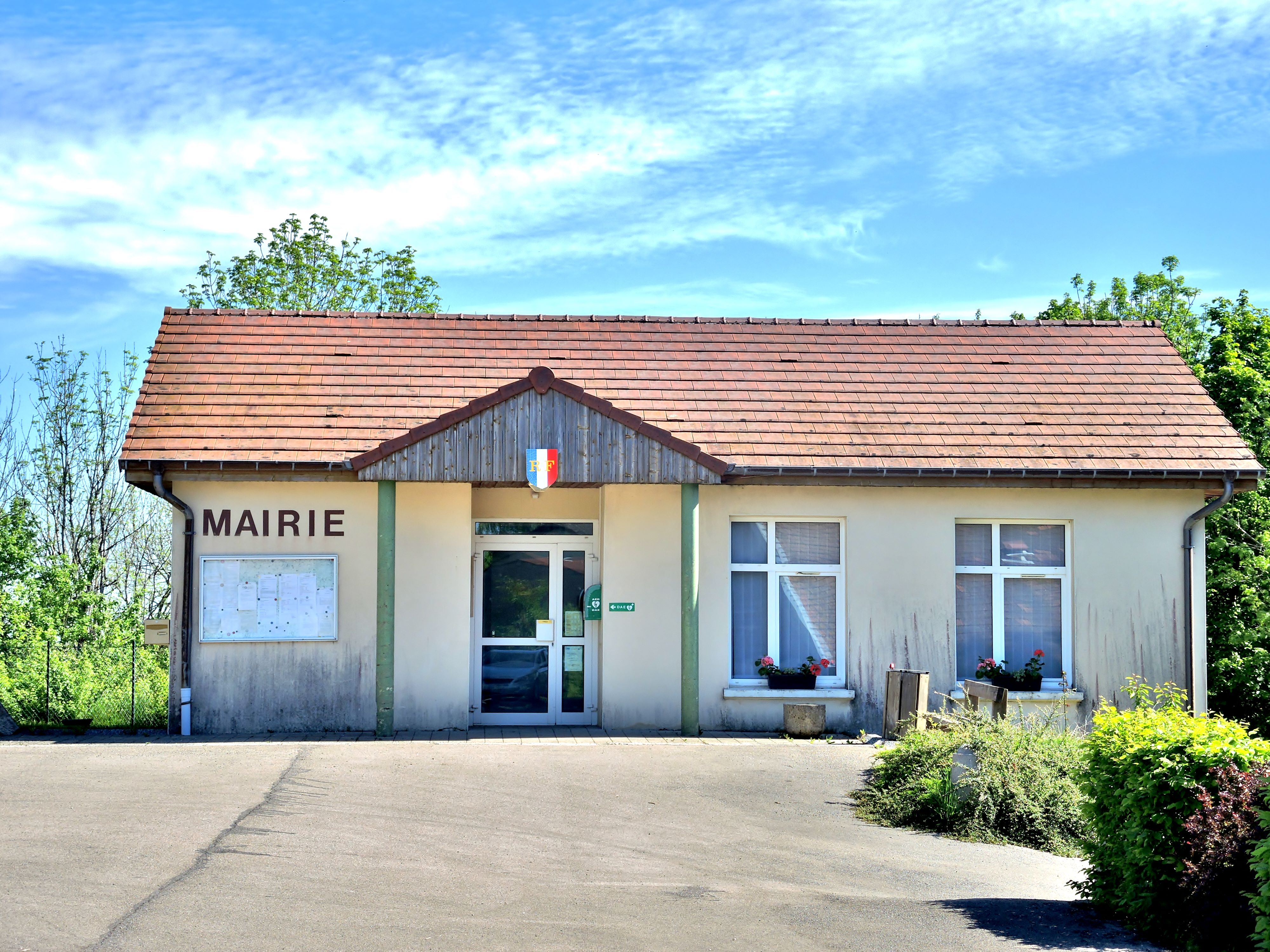 Mairie de Passavant. Doubs